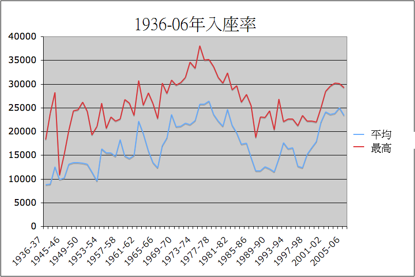 中文（香港）: 1936年至2006年樸文路球場入座率